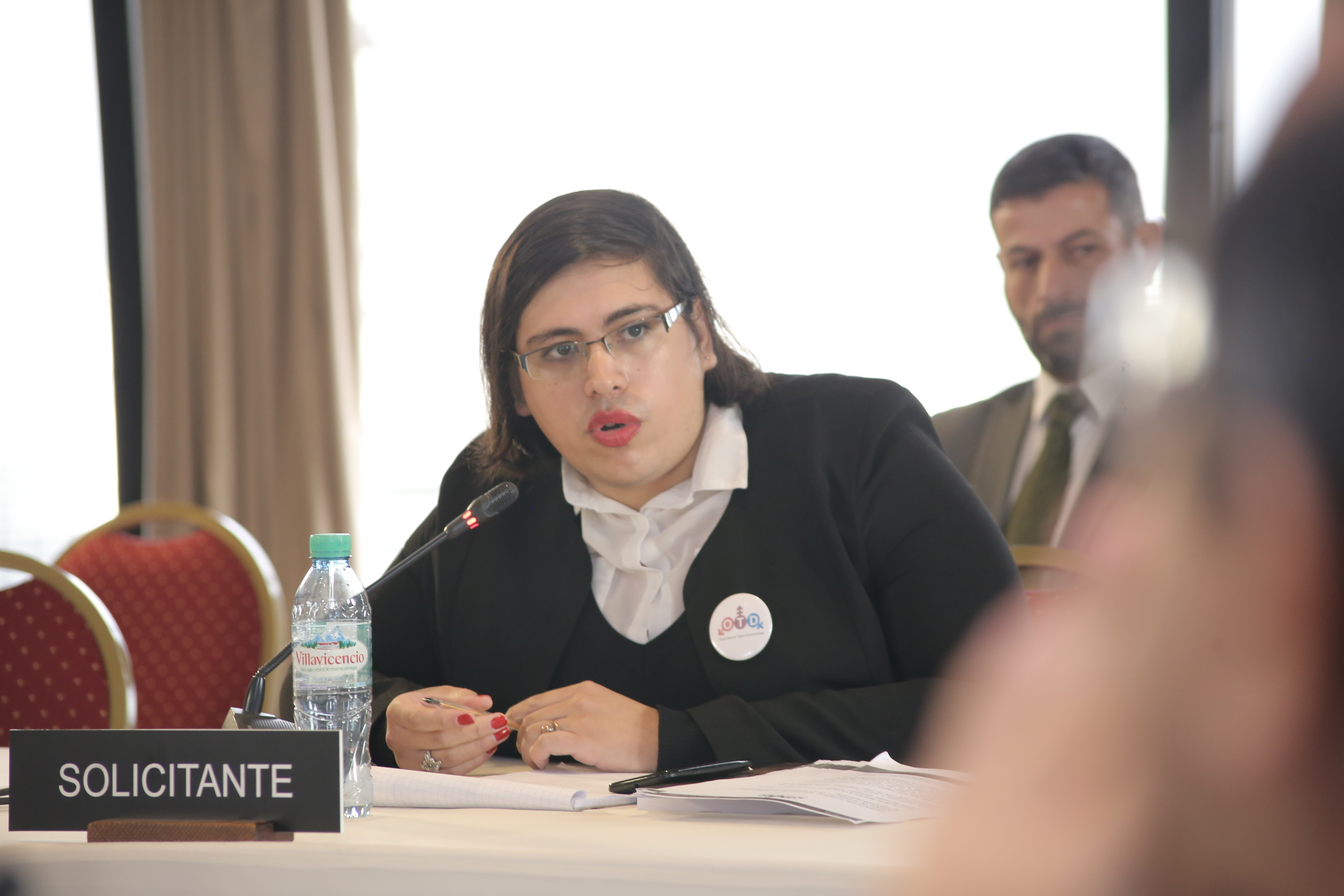 162 Periodo Extraordinario de Sesiones en Buenos Aires Miércoles 24 de mayo de 2017 Sociedad Civil: Constanza Valdés de Organizando Trans Diversidades (OTD Chile). Fotos: Ricky Levy/CIDH